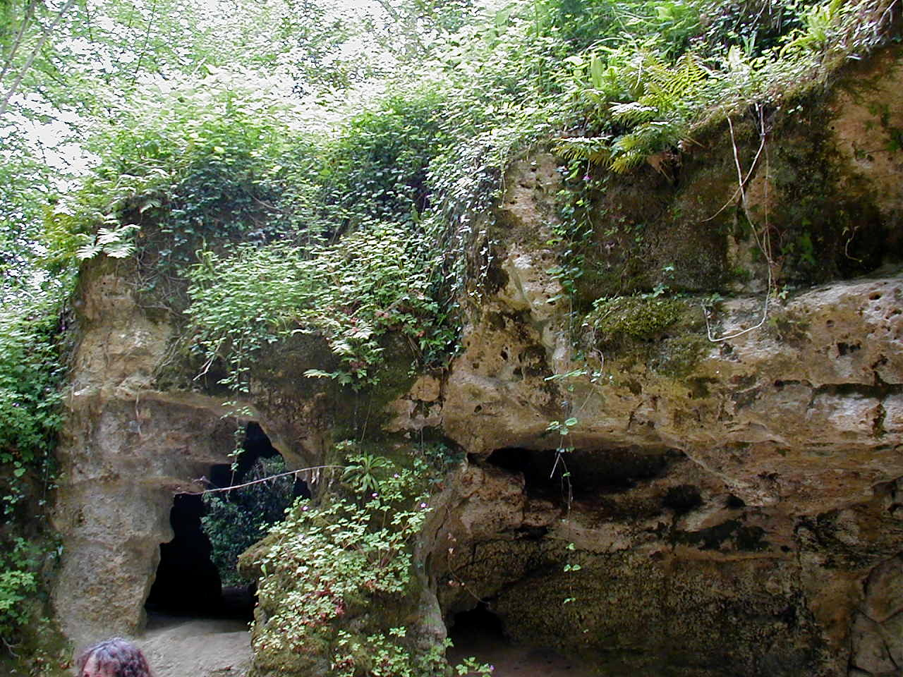 Entrée de la grotte de Pair-non-Pair (33 France)